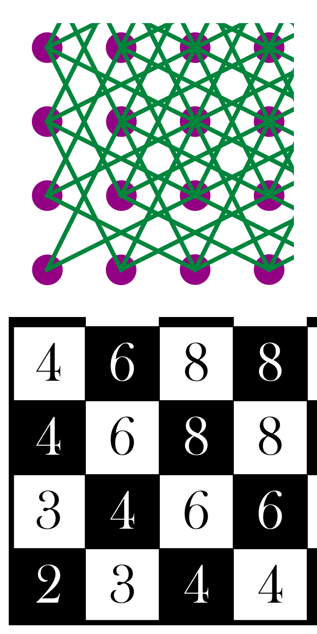 Graphe de la marche du cavalier sur l'échiquier (quart SO), et degré des sommets